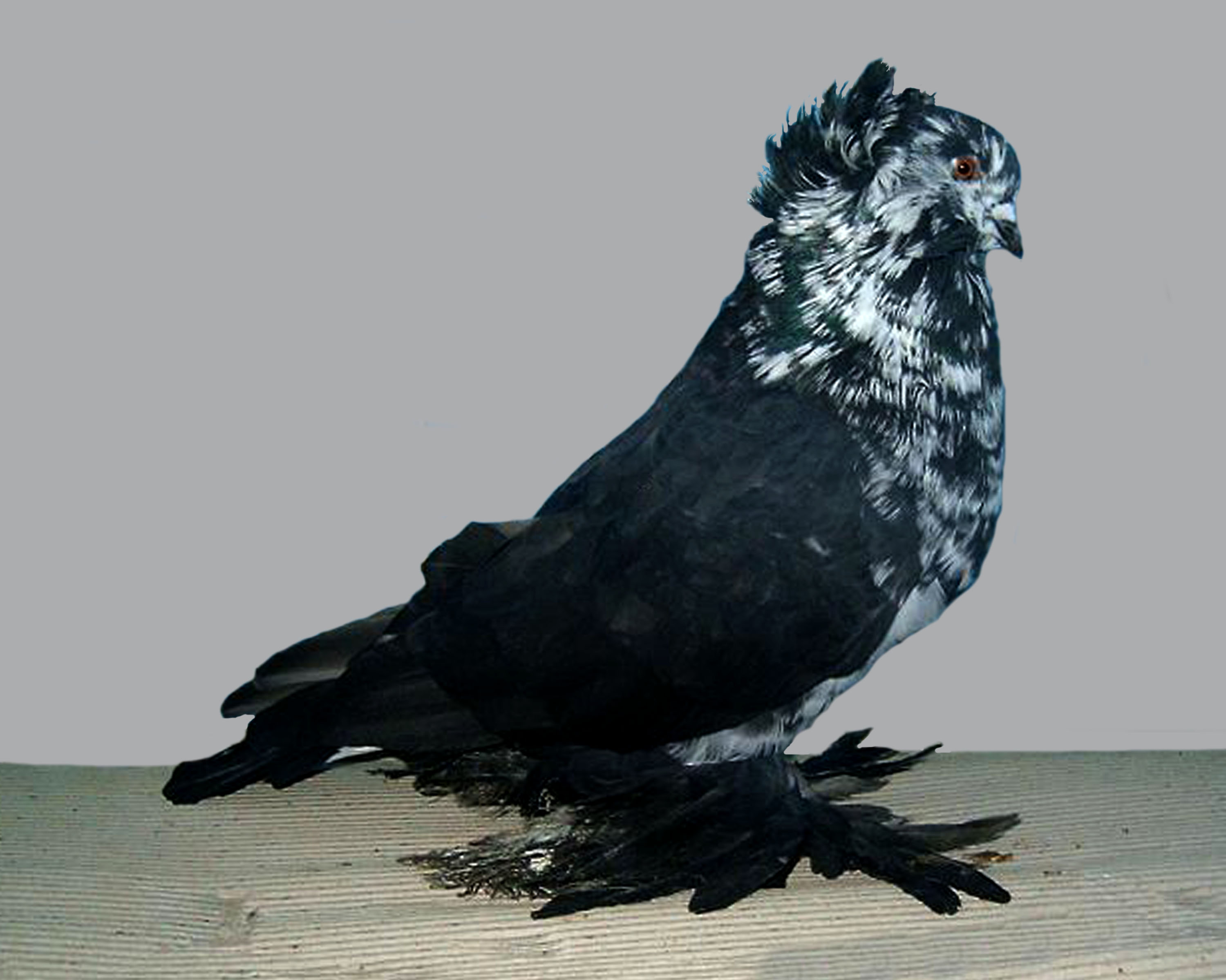 Hungarian Giant House Pigeon Black Tiger)